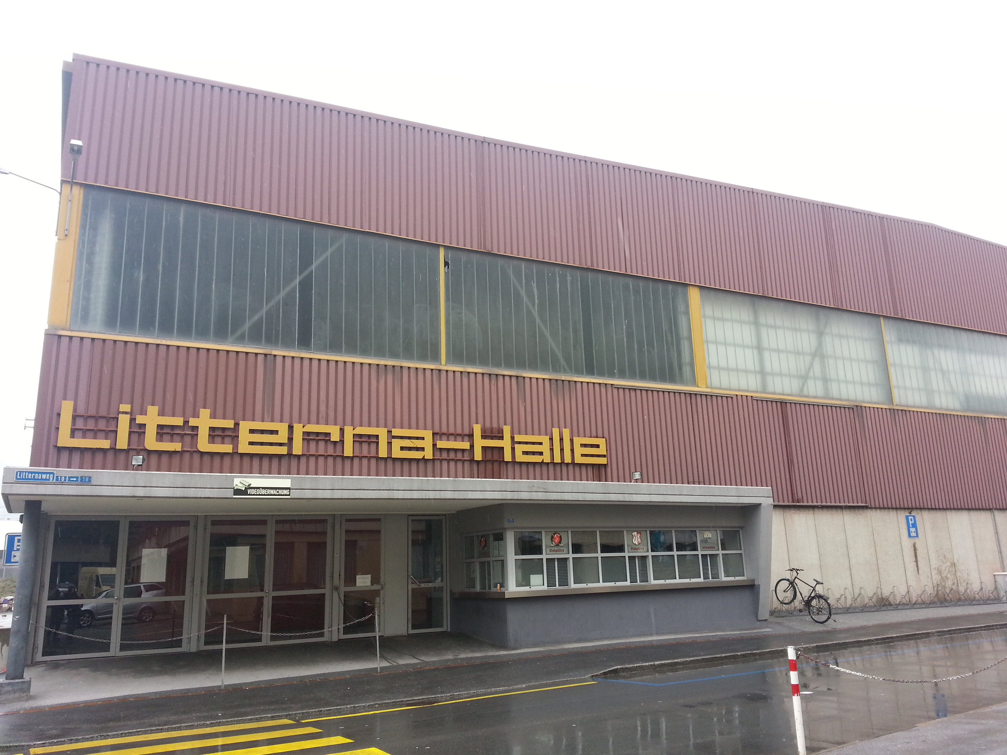 Aussenansicht der Litternahalle